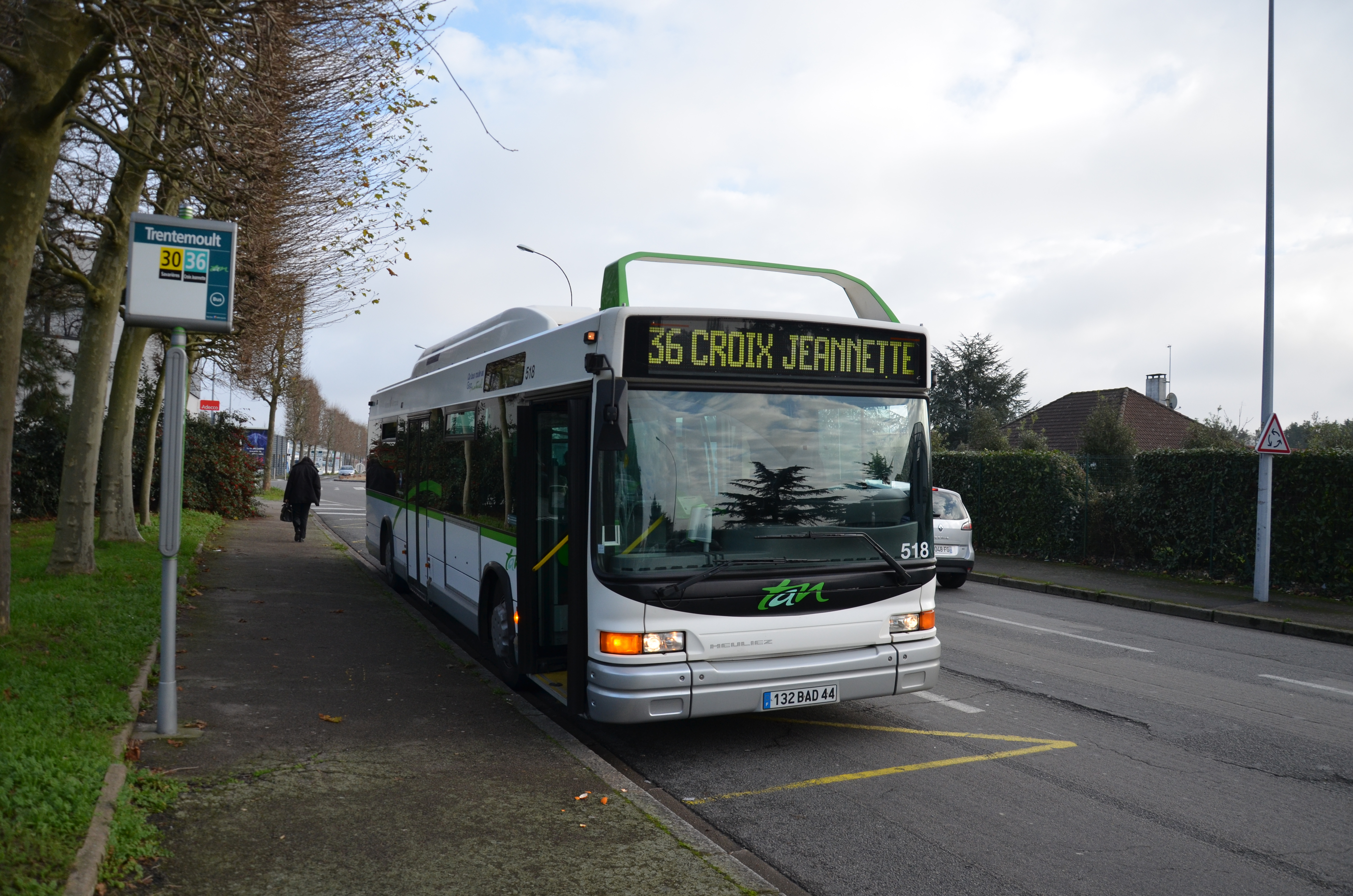 Heuliez GX 317 n°518 sur la ligne 36 TAN de Nantes, à l'arrêt Trentemoult.